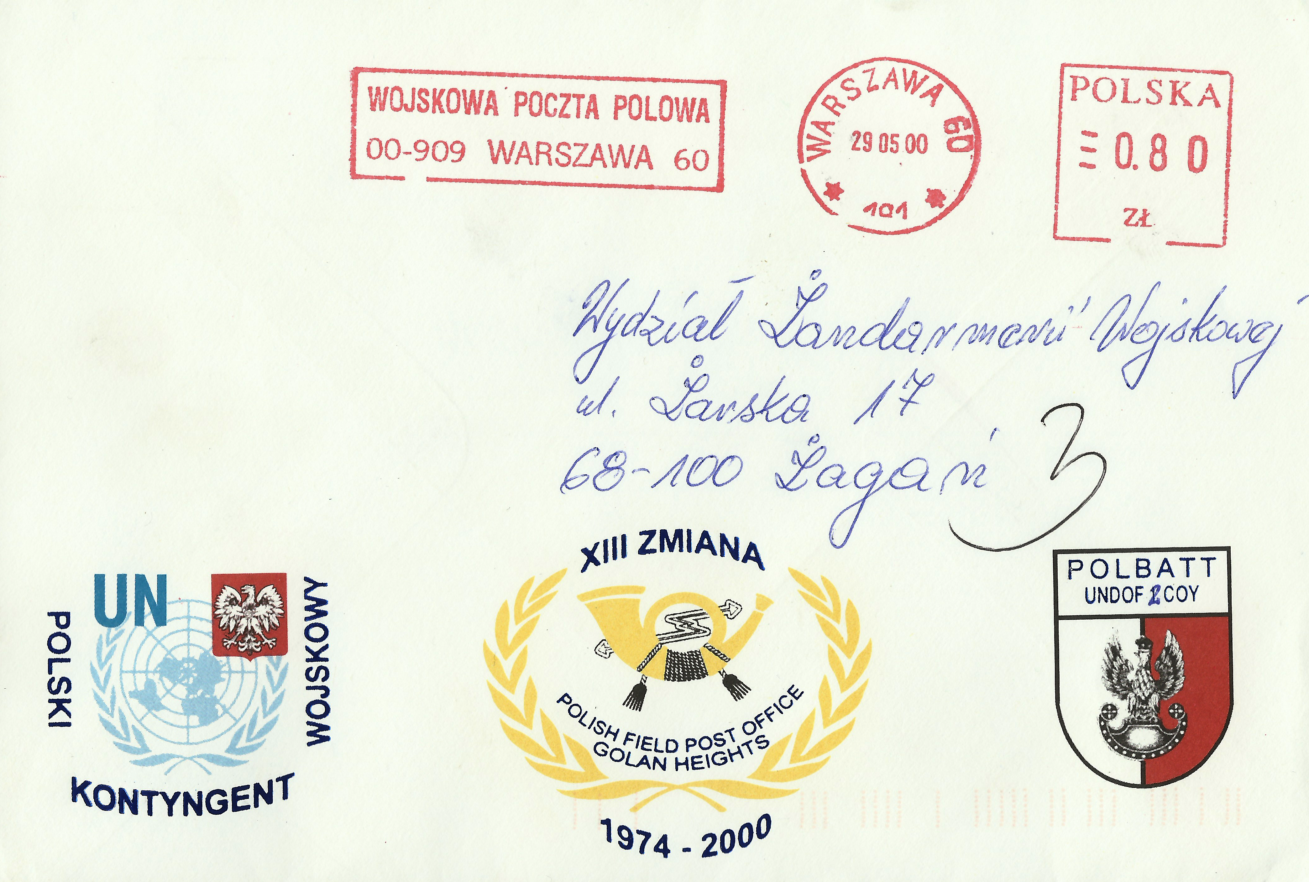 Wojskowa Poczta Polowa. Koperta listowa z nadrukiem odznaki pamiątkowej 2 kompanii POLBATT, PKW UNDOF, Polskiej Poczty Polowej na Wzgórzach Golan 1974-2000. XIII zmiana.